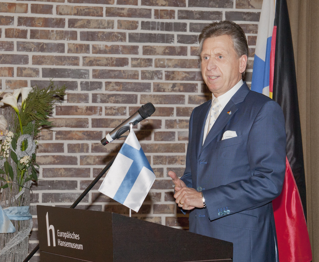 Konsul Bernd Jorkisch